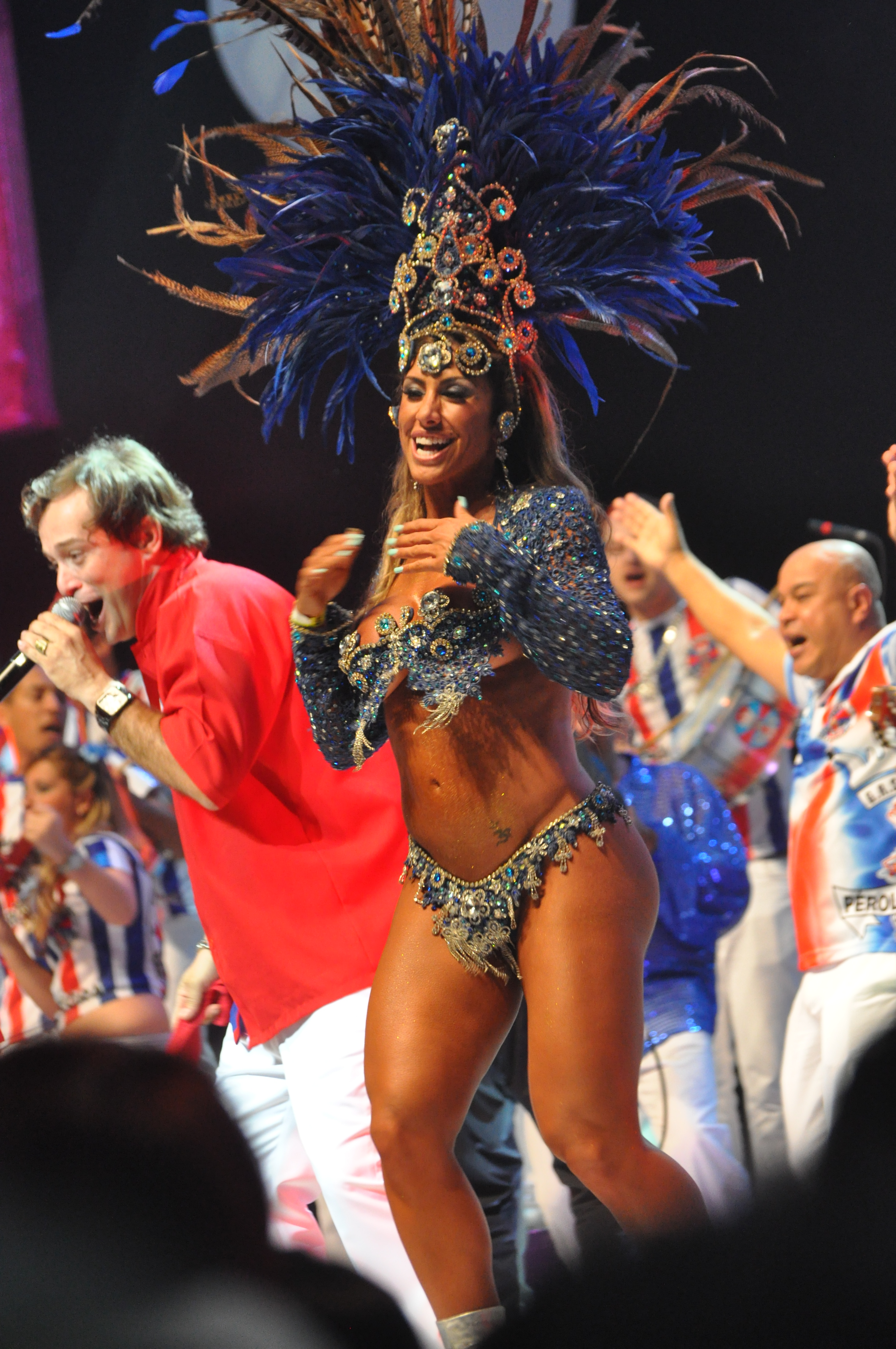 Gravação da vinheta da Pérola Negra - Itanhaém (194)